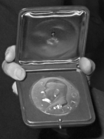 Dr. M. C. Tever (rechts) ontving de Gilles Holst medaille uit handen van prof. H. B. G. Casimir (links) 16 december 1967